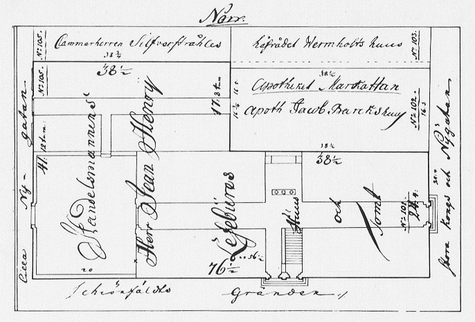 Tomtkarta över kvarteret Thisbe